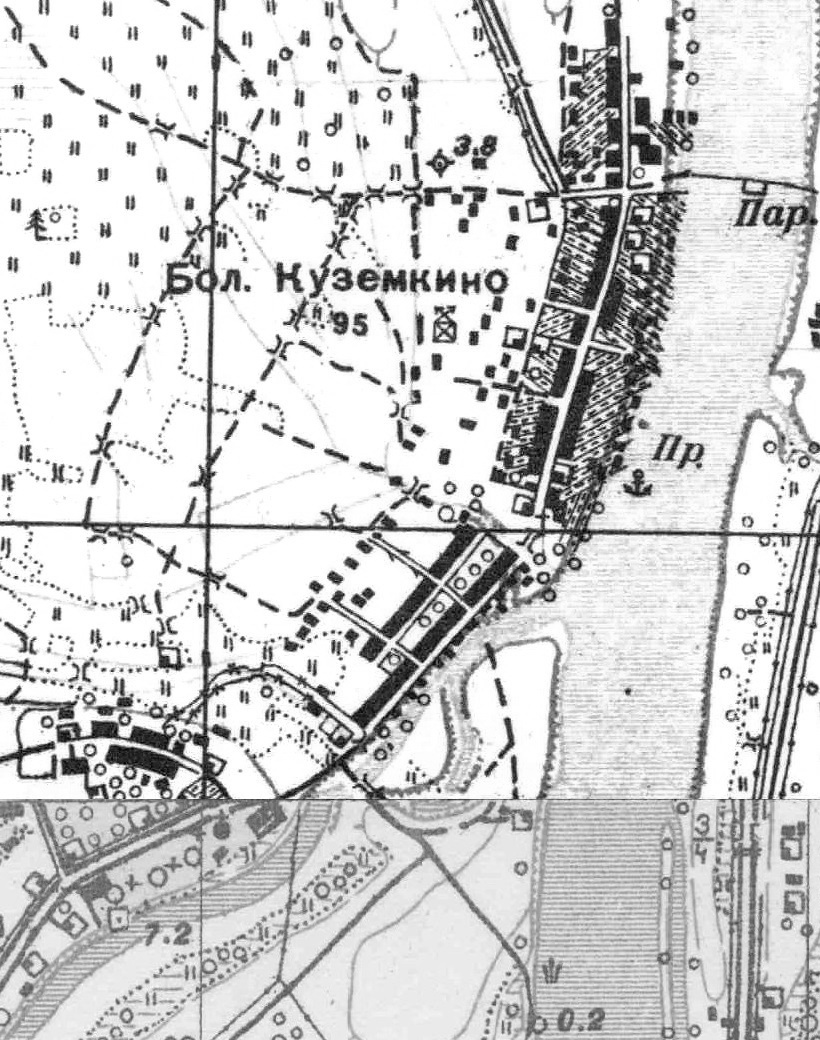 Топографическая карта Ленинградской области, квадрат О-35-21-А-б (Бол. Куземкино), деревня Большое Кузёмкино.